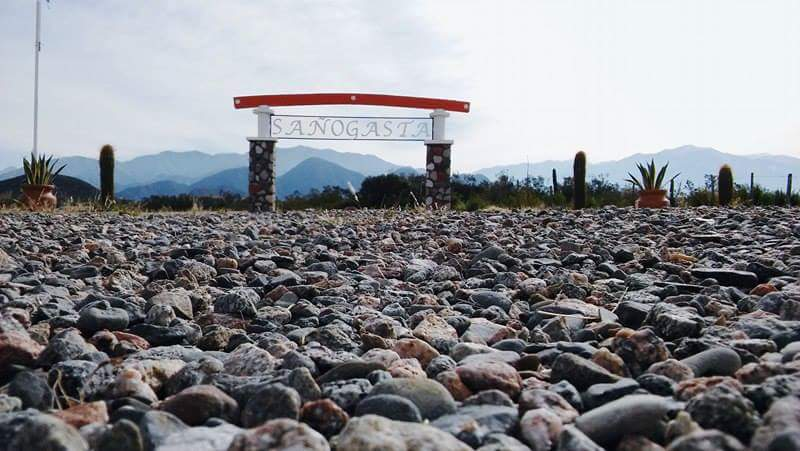 Entrada al pueblo Sañogasta, Chilecito, La Rioja